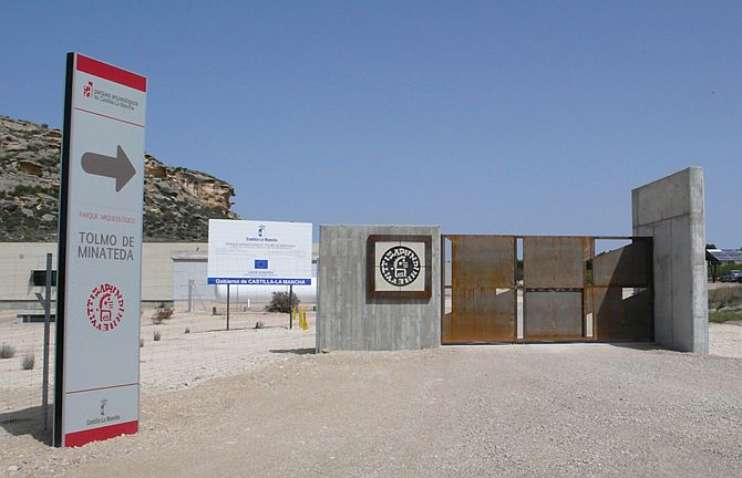 x